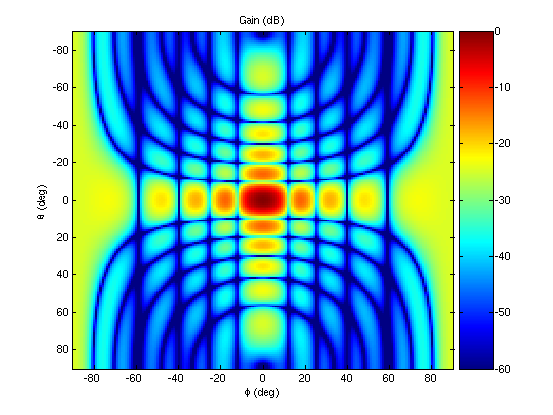 Figure de diffraction en puissance, normalisée par rapport à la puissance maximale, d'une ouverture rectangulaire éclairée par un champ constant (fréquence de travail 10 GHz, ouverture en x (axe horizontal) : 20 cm, ouverture en y (axe vertical) : 10 cm.